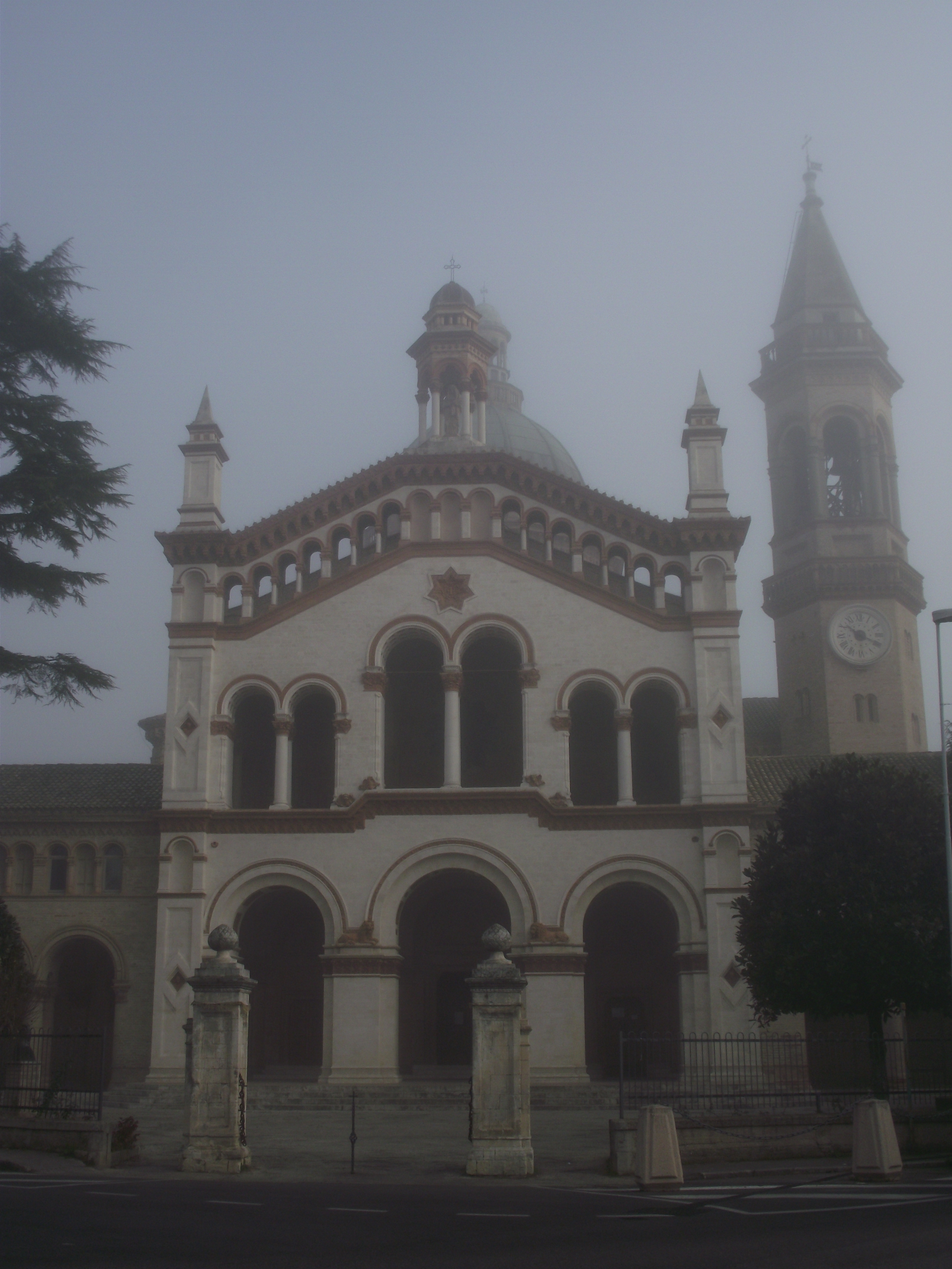 Osimo, Santuario di Campocavallo, XIX secolo